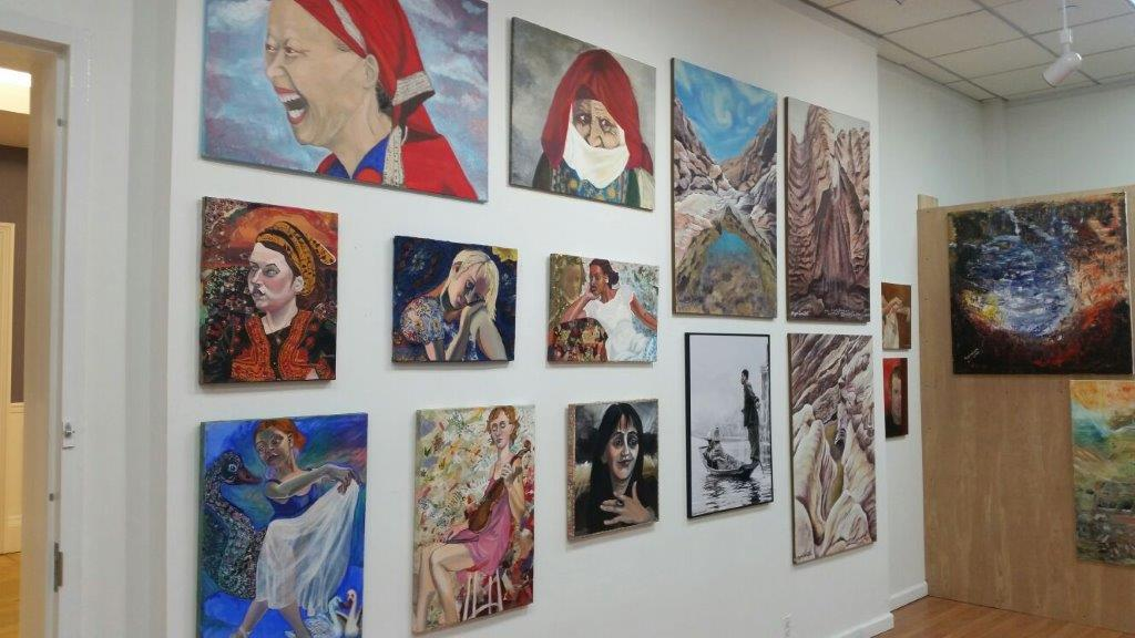 יעל ניצן